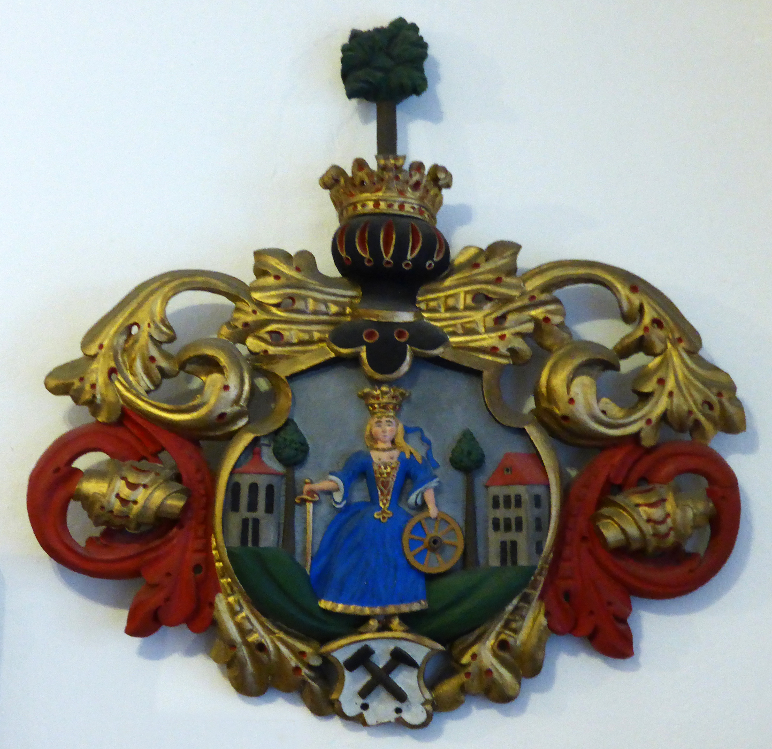 Stadtwappen von Buchholz - Erzgebirgskreis - Sachsen.